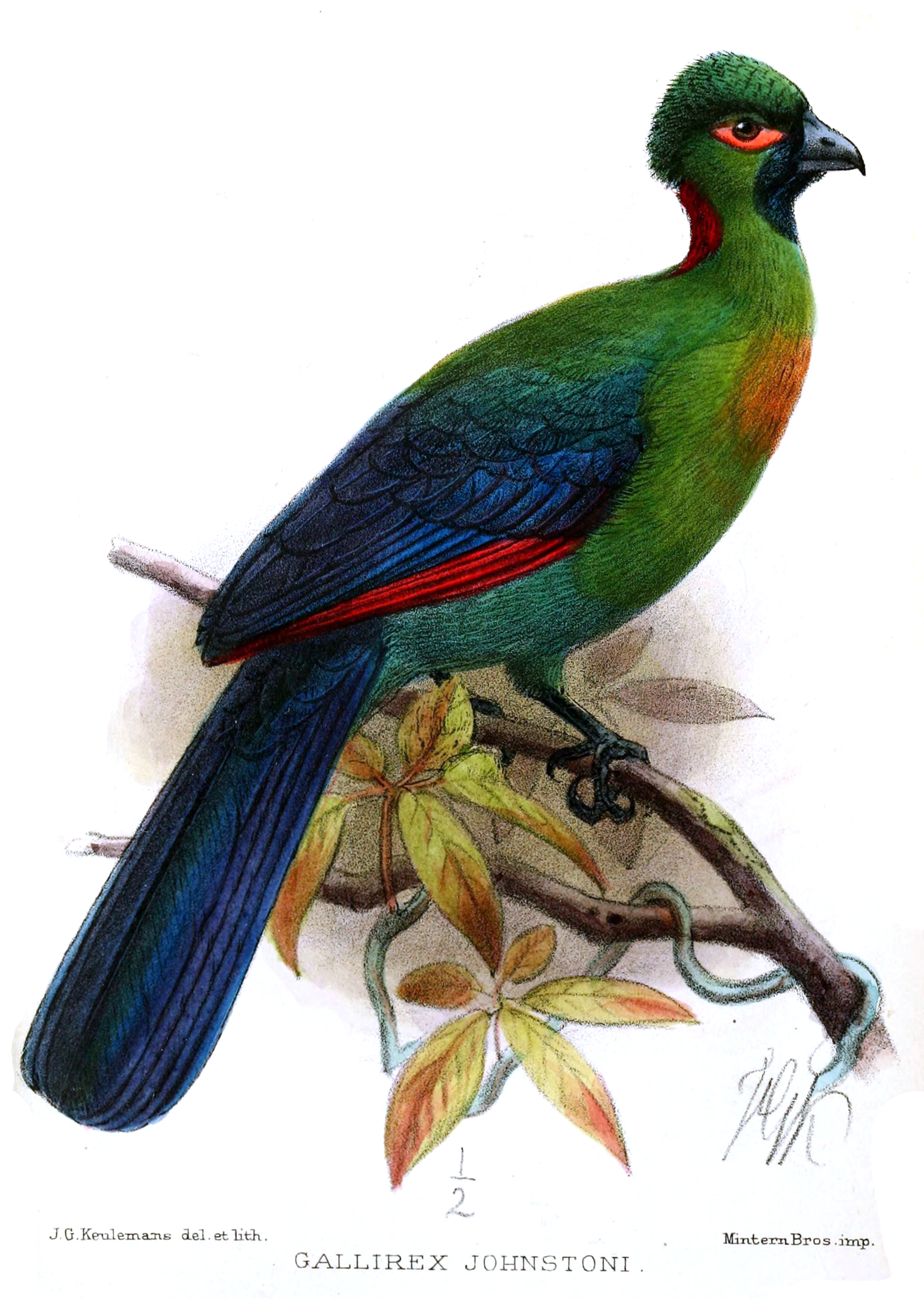 Gallirex johnstonii (synonym of Ruwenzorornis johnstoni)